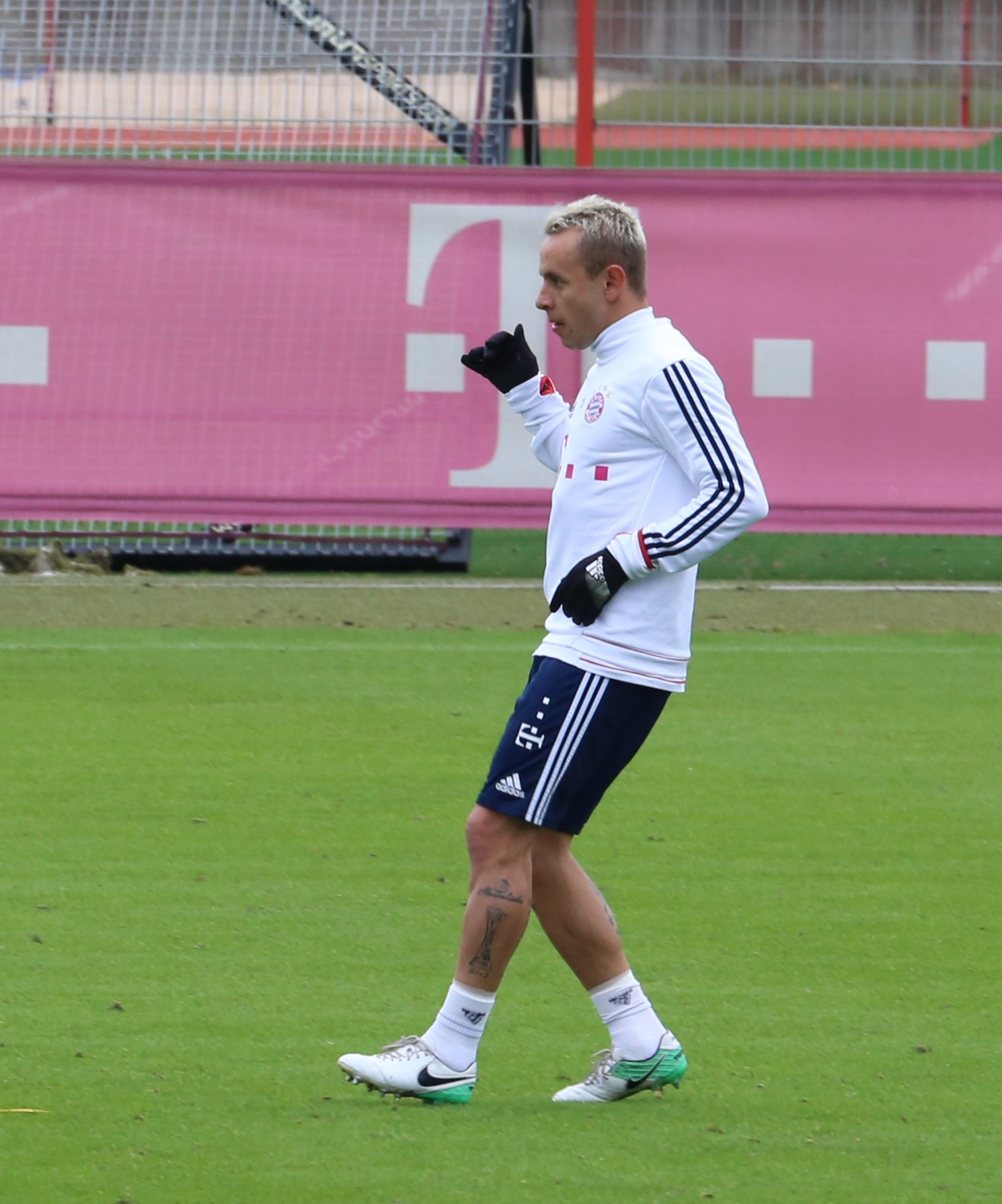 Rafinha beim Training auf dem Gelände des FC Bayern München (Januar 2018)